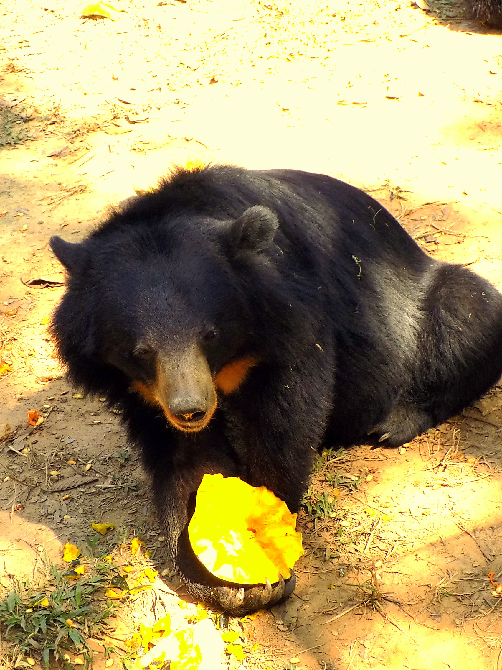 Dulahazra safari park cox's bazar